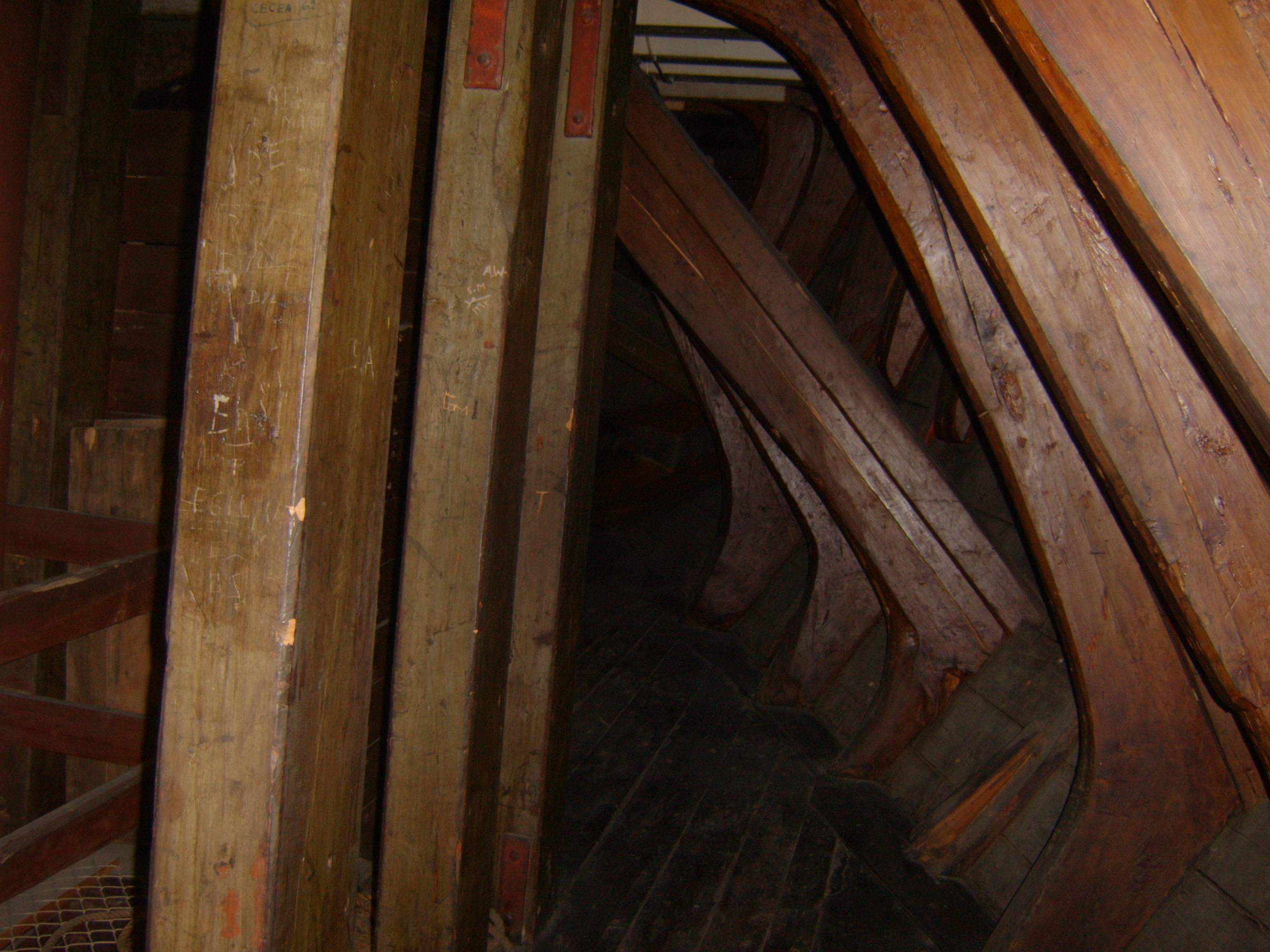 Fram museum, Frammuseum Oslo, Norway